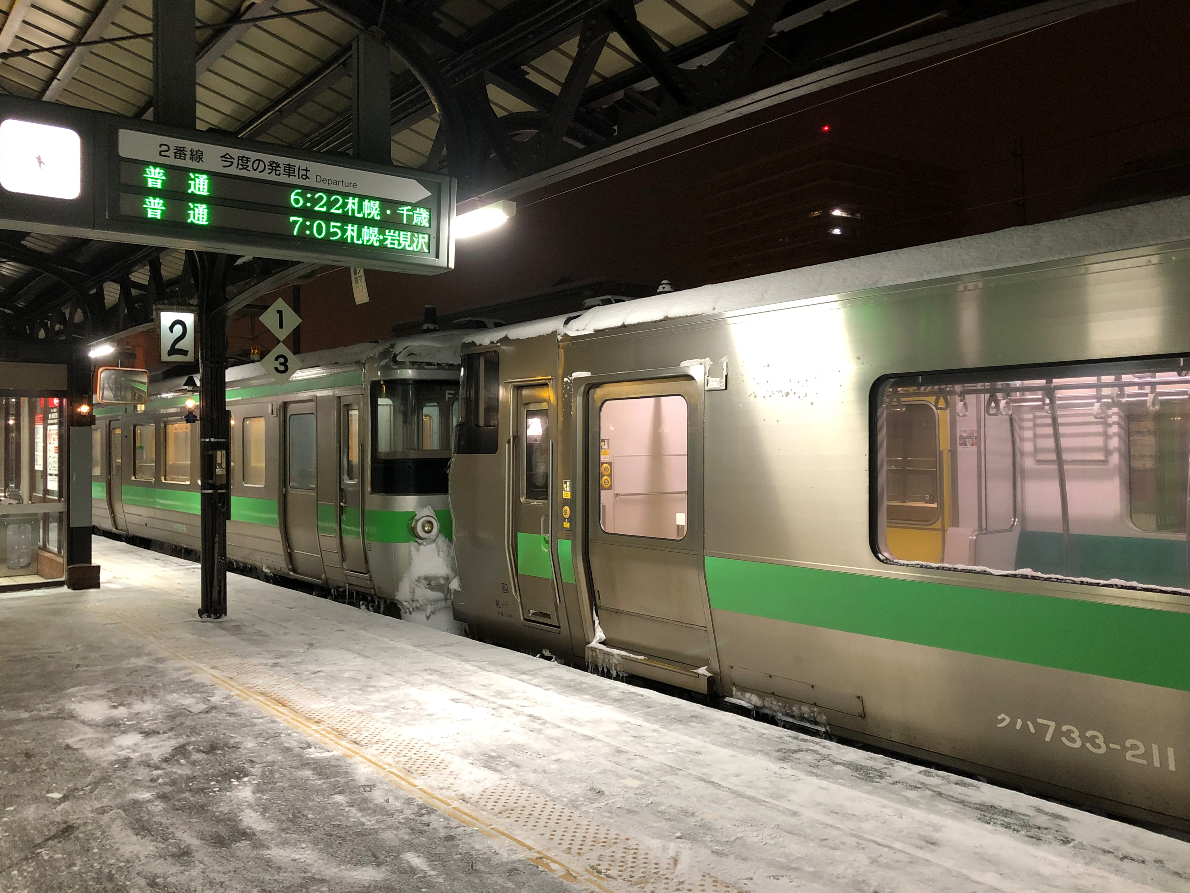 733系と721系が併結された千歳行普通列車1732M（2020年2月6日、小樽駅にて撮影）